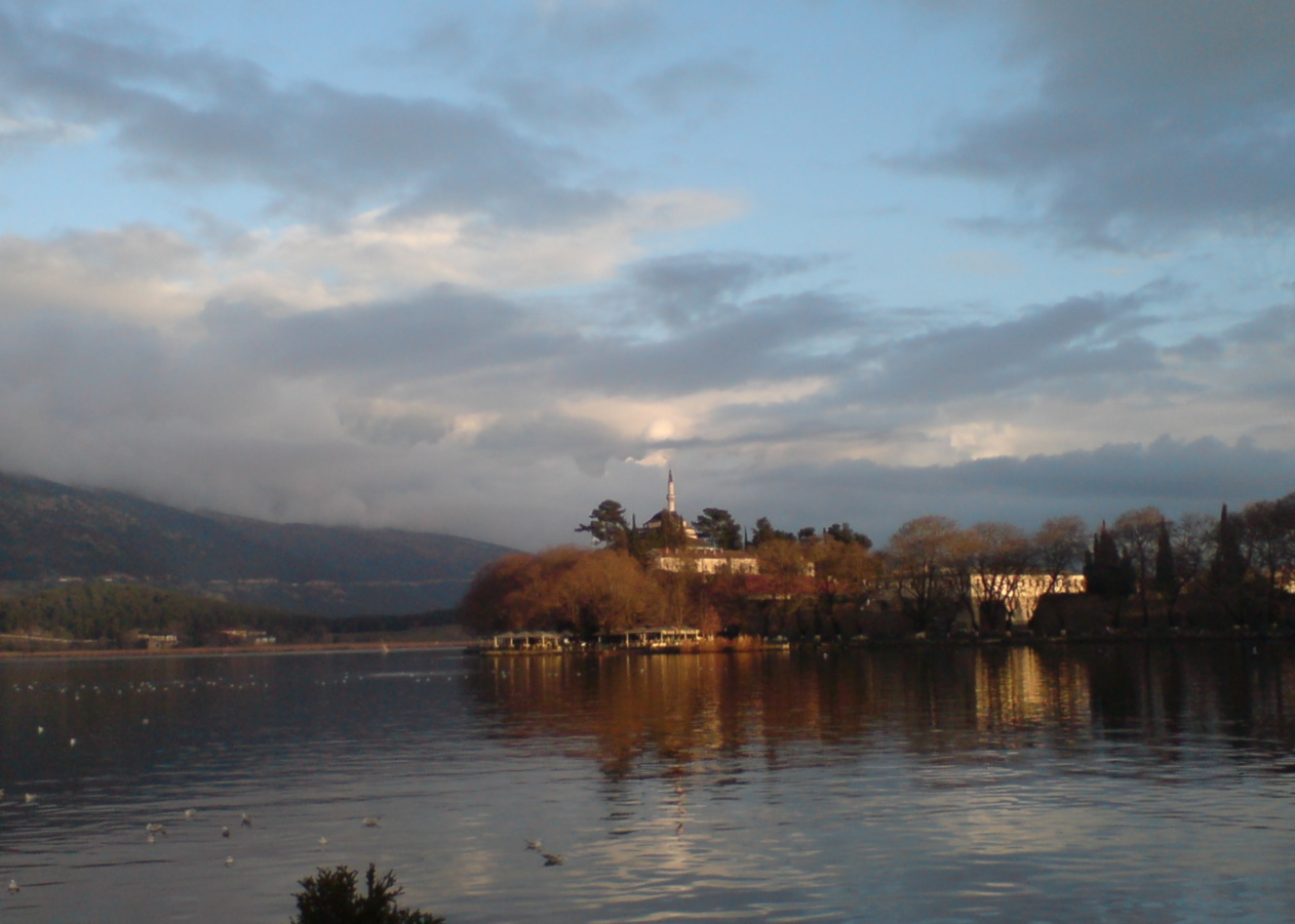 Pamvotida Lake, Ioannina, Greece.